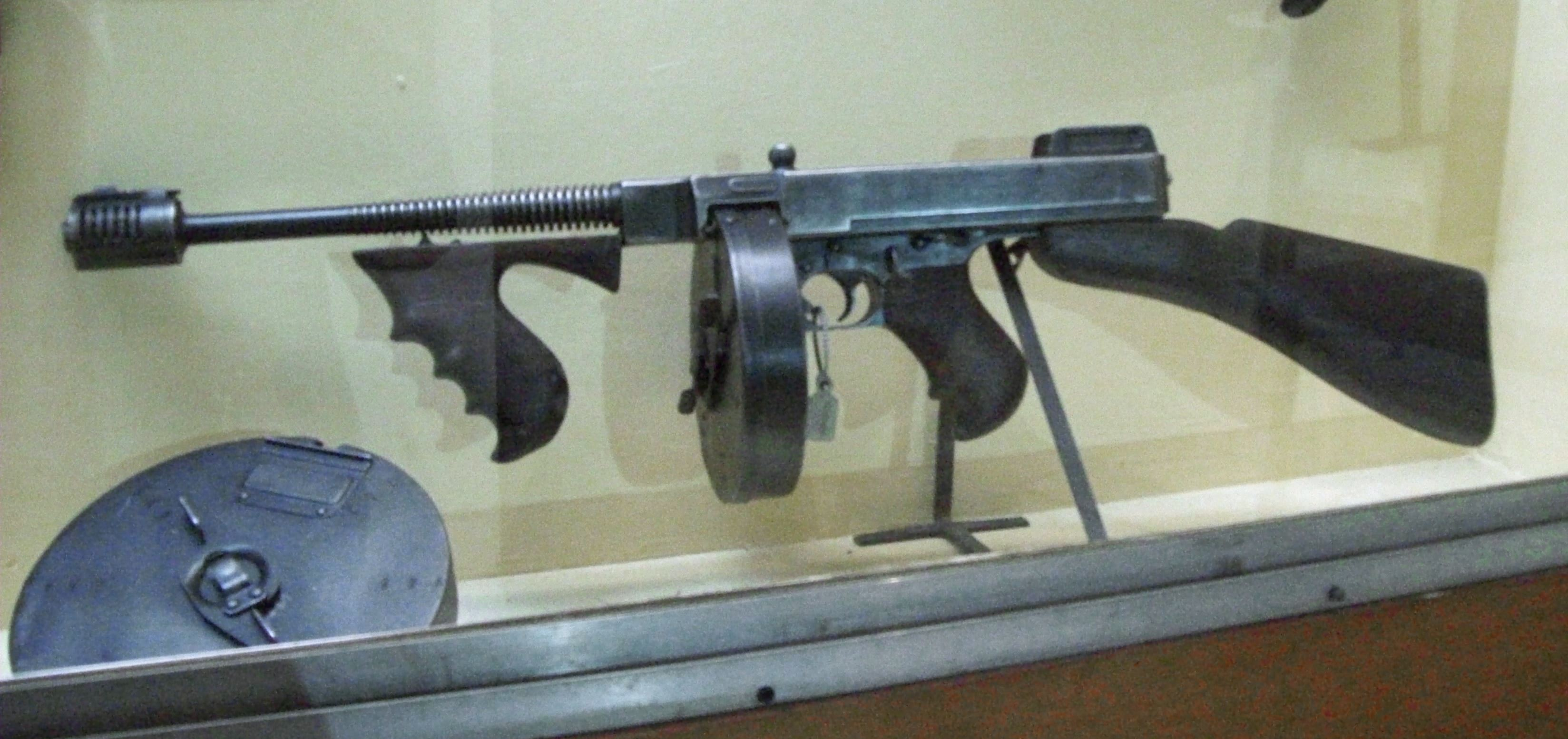 expuesto en el Museo de Armas, ciudad de Buenos Aires, Argentina 2014.